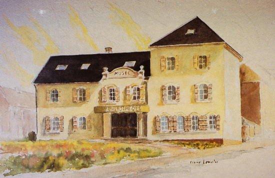 Musée de la Romanche - Livet-et-Gavet